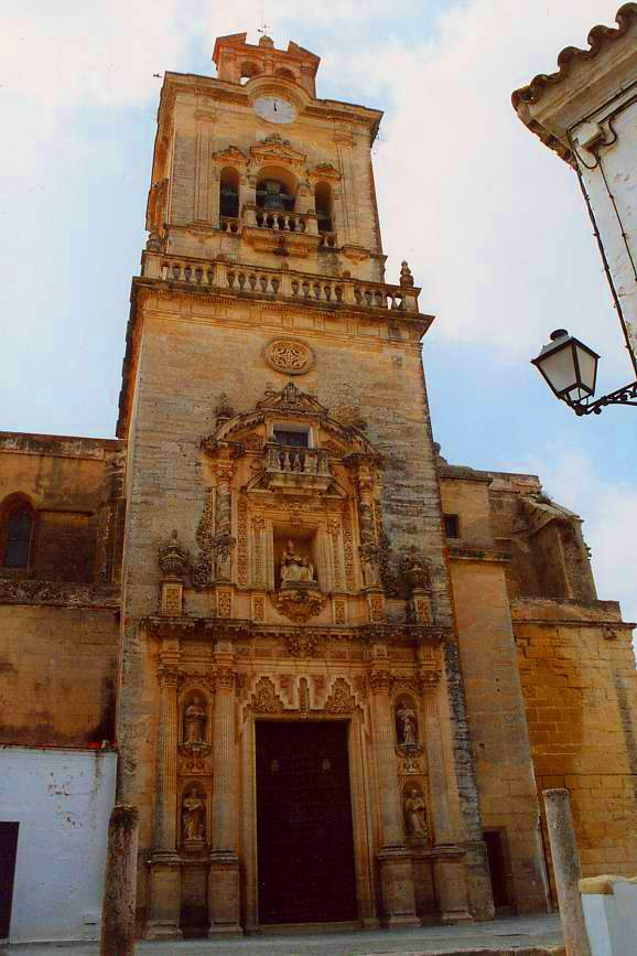 Ciudad de Arcos de la Frontera